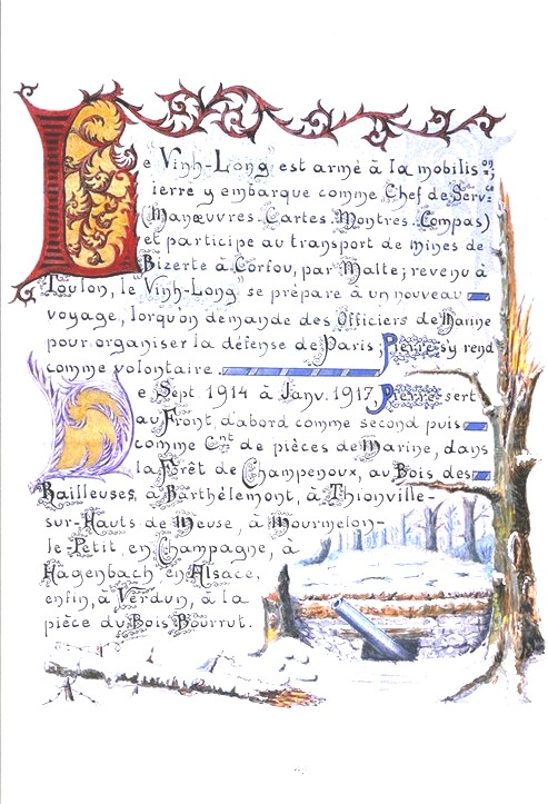 Photographie de la page 46 par le Chevalier Henri Goybet du livre de famille du général Mariano Goybet son arrière grand père .rédigé de 1898 à 1931 retraçant l'histoire de sa famille. Oeuvre de plus de 200 pages numérotées sur parchemin avec très belles enluminures consultable aux archives de Savoie cote Ij 288. Cette image retrace la carrière du fils de Mariano Goybet le contre amiral Pierre Goybet